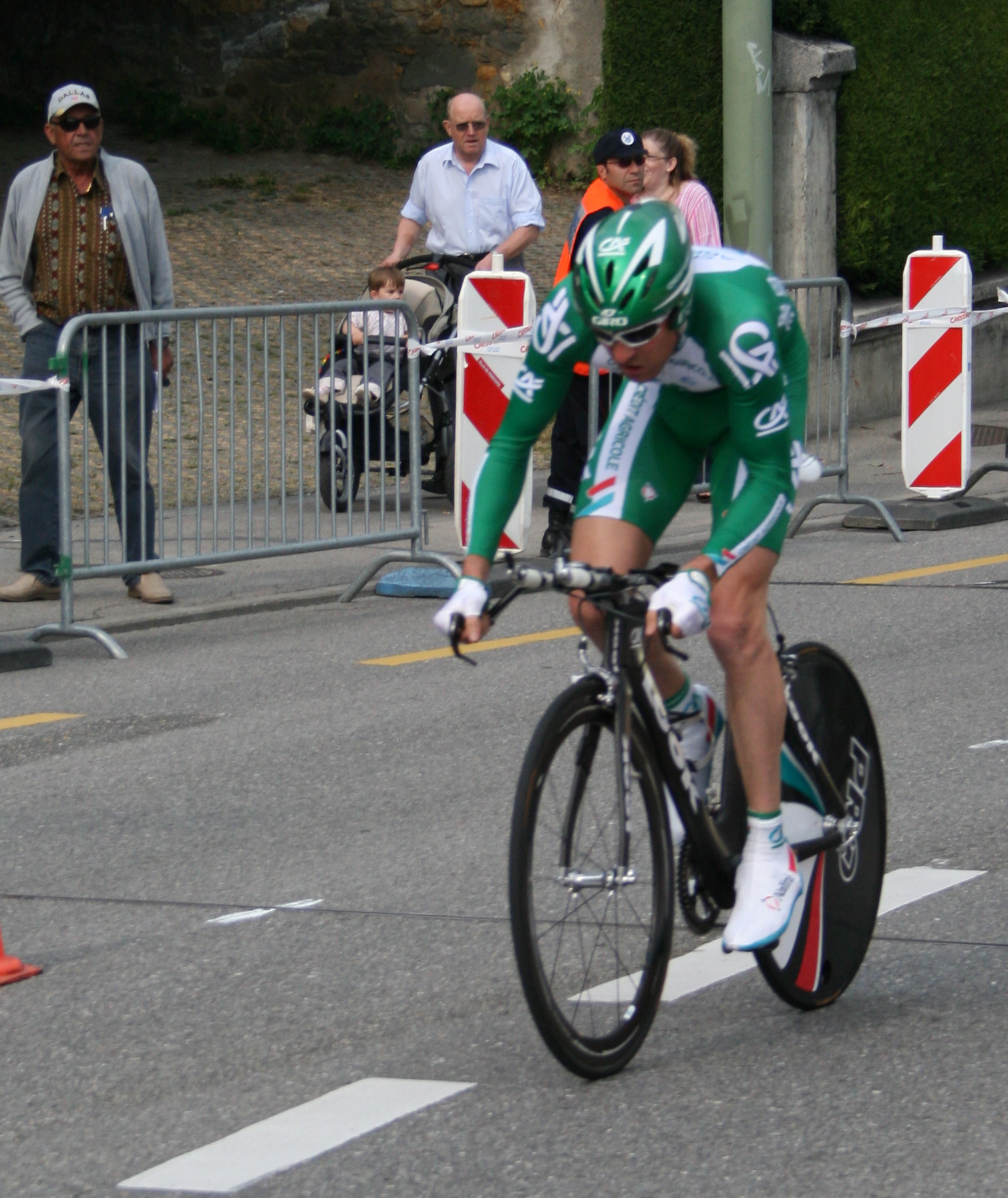 Patrice_Halgand prologue du Tour de Romandie 2007